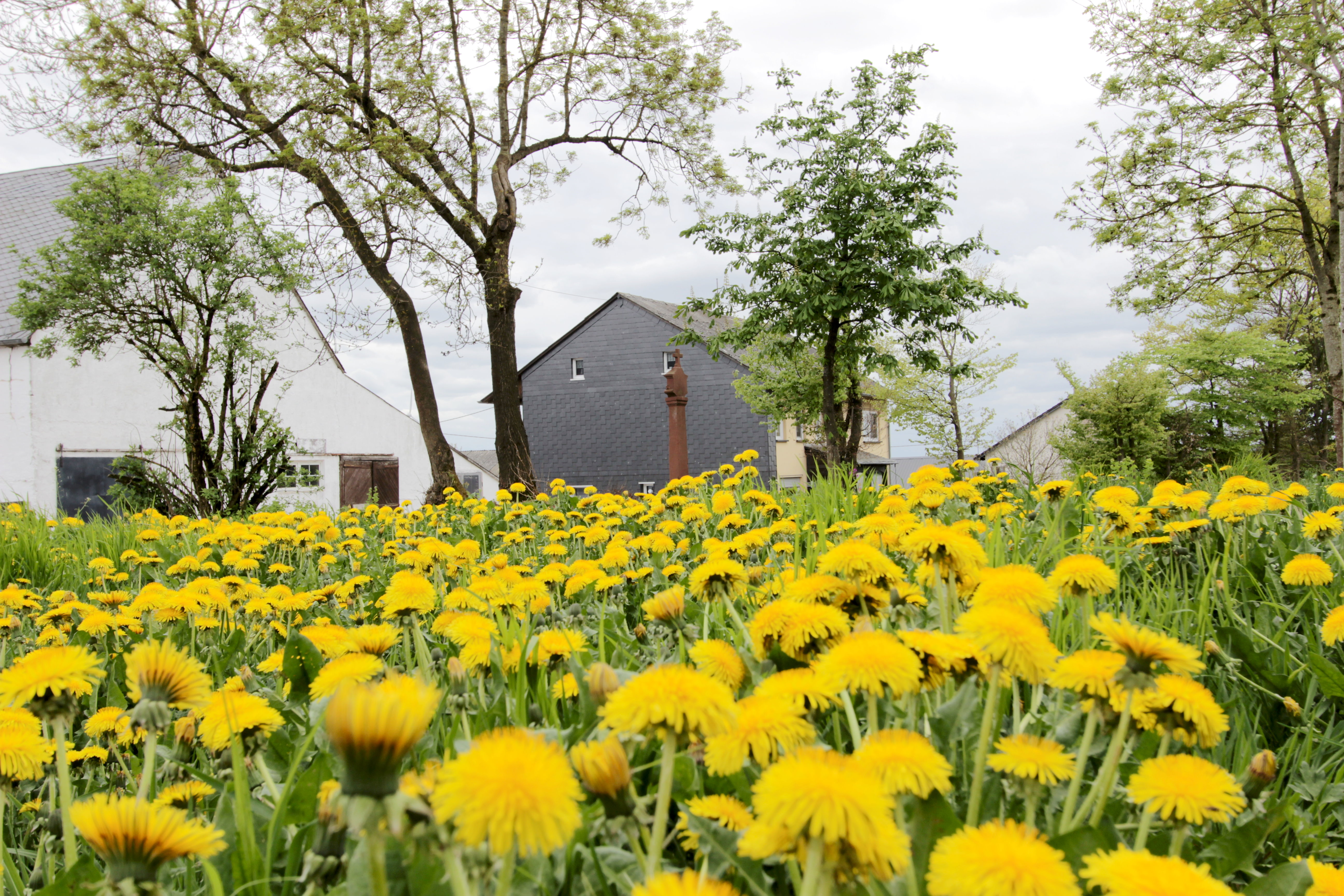 54673 Krautscheid, Dorfstraße. Blick auf den Bildstock von 1781. Aufnahme von 2018.